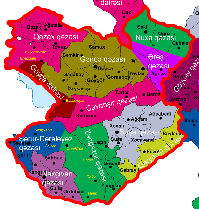 Gəncə quberniyası